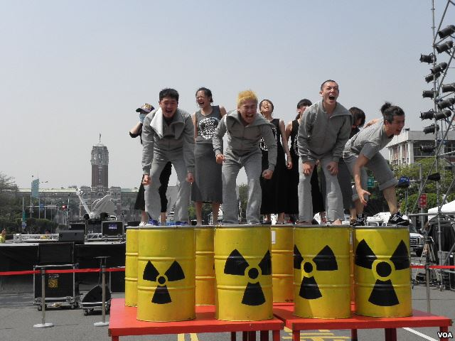 309廢核大遊行，總統府前核災痛苦活報劇。